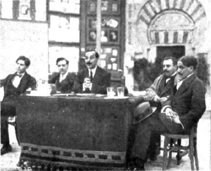 Fotografía que muestra al escritor español Luis de Tapia dando una conferencia en una exposición de arte decorativo.